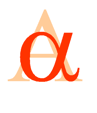 Greek letter